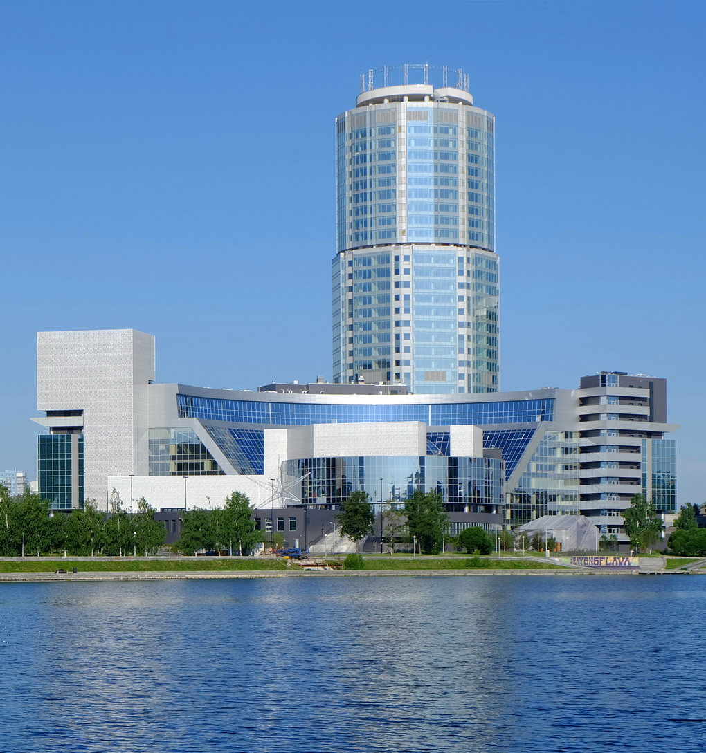 Здание делового дома "Демидов" (небоскрёб высотой 124м) и Президентского центра Б.Н. Ельцина (9-этажная часть на переднем плане) в Екатеринбурге.